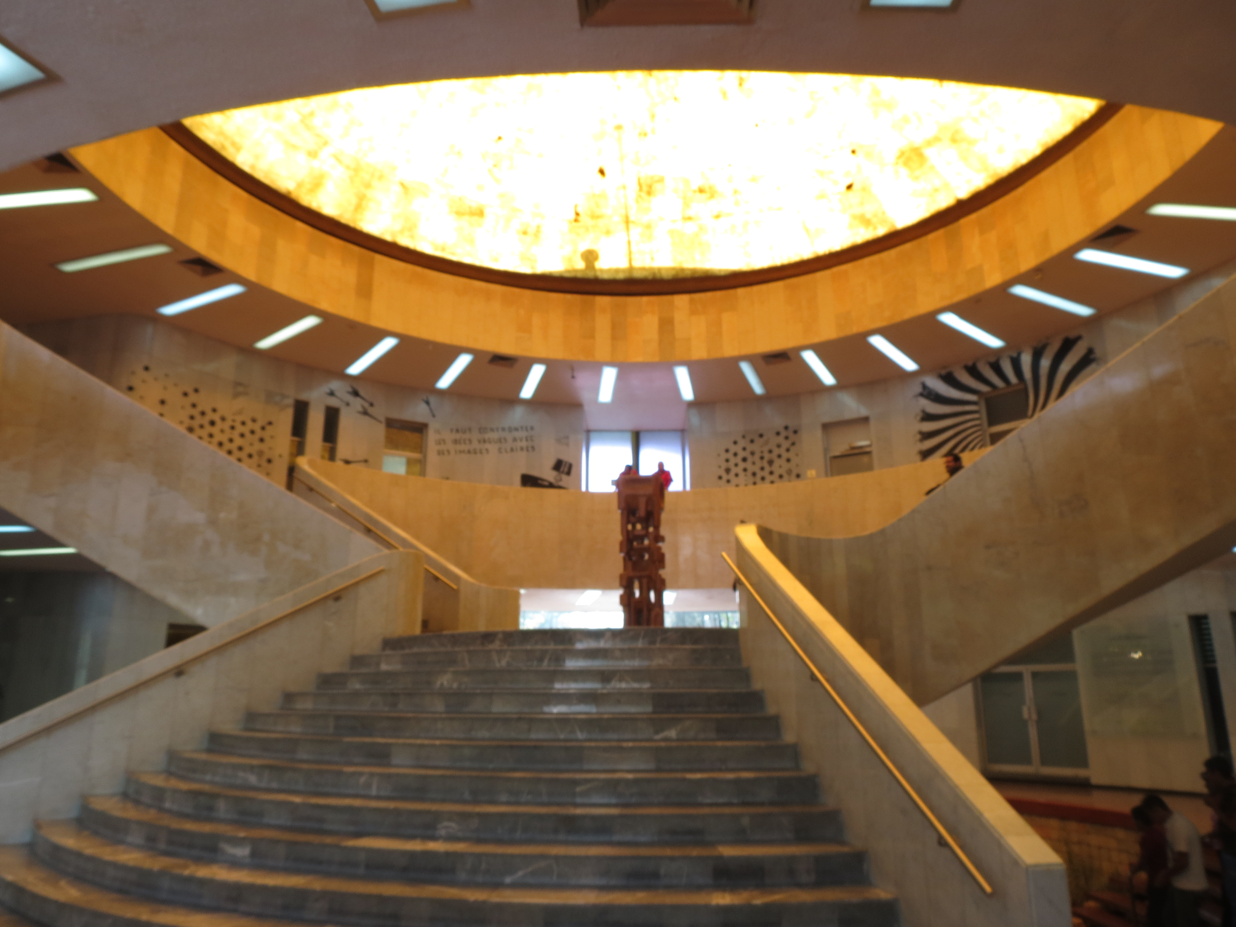 Detalles del Museo de Arte Moderno de la Ciudad de México